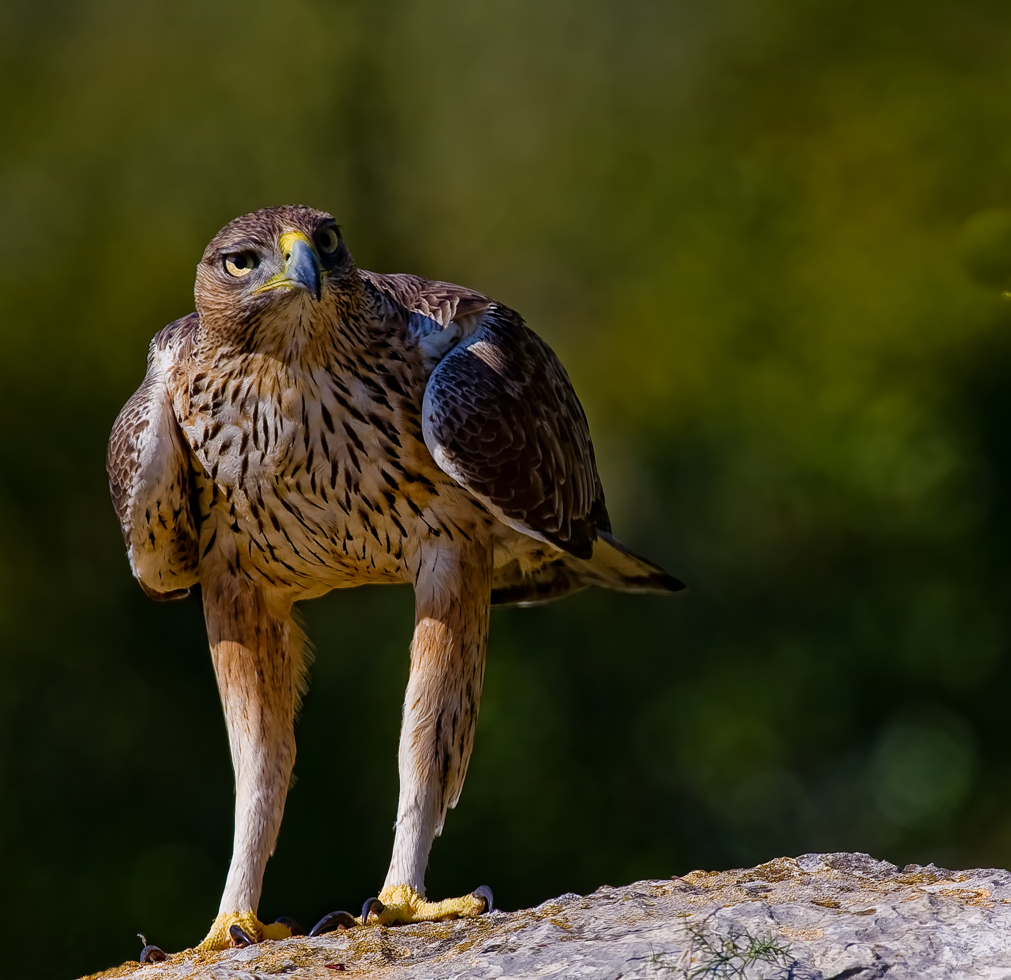 Aquila fasciata, Castellón, Valencia, Spain